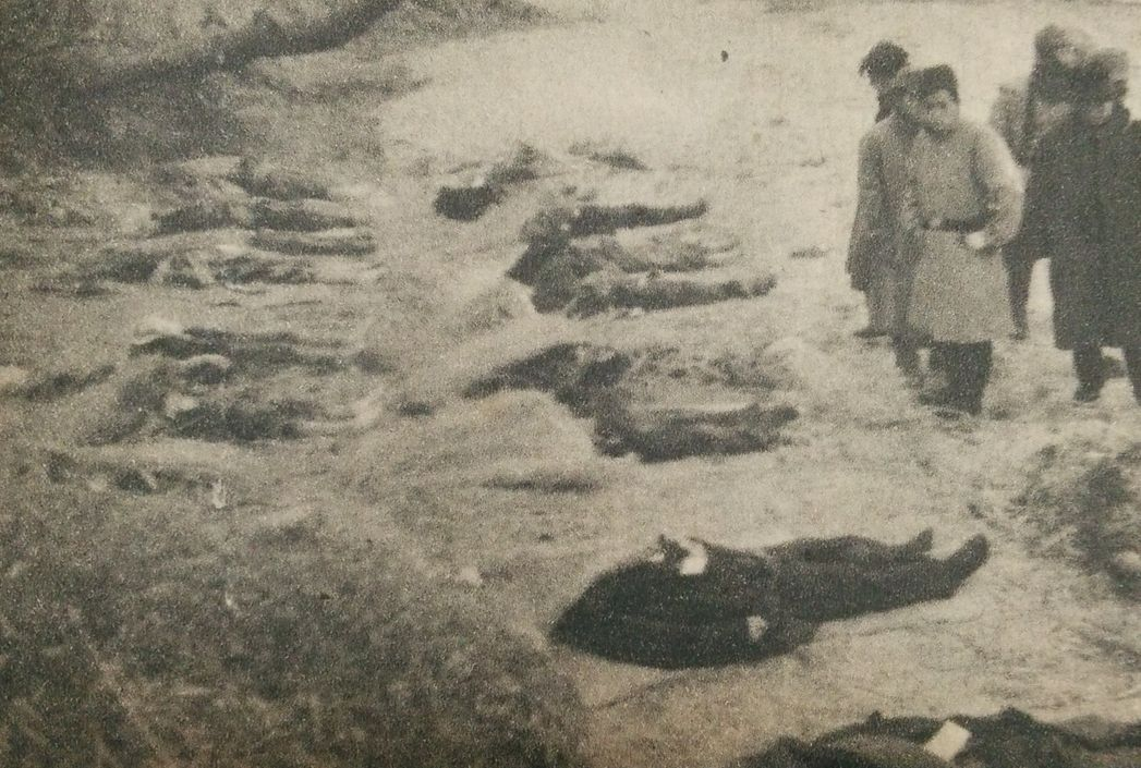 女王丸触雷沈没事故の犠牲者